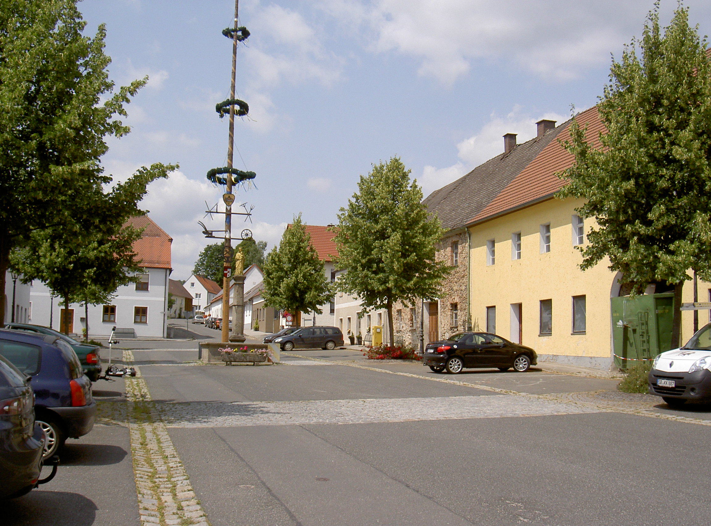 Winklarn Brunnen mit Mariensäule auf dem Marktplatz